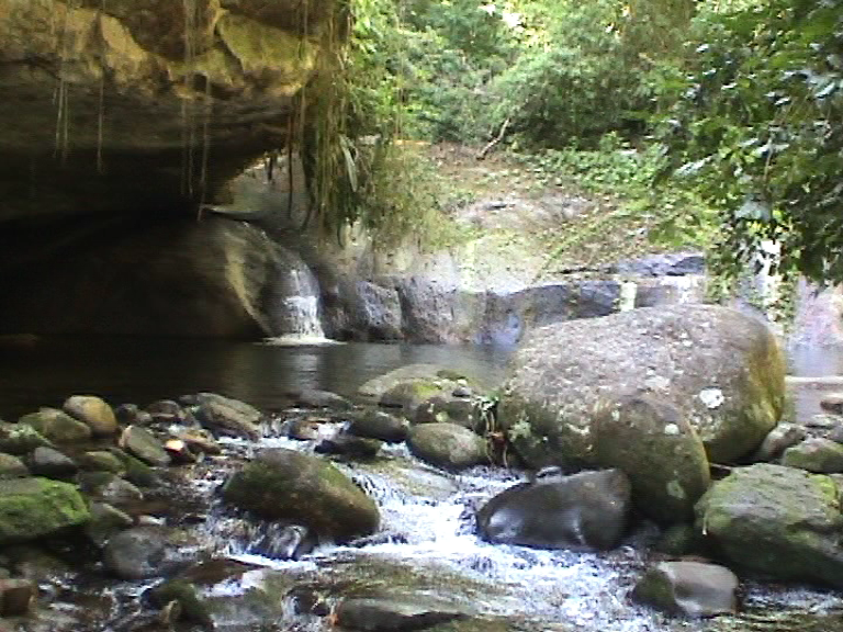 Mata Atàntica - Cachoeira da toca.